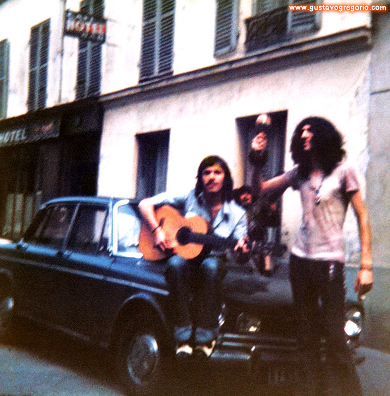 Con Daniel Irigoyen en París, 1973